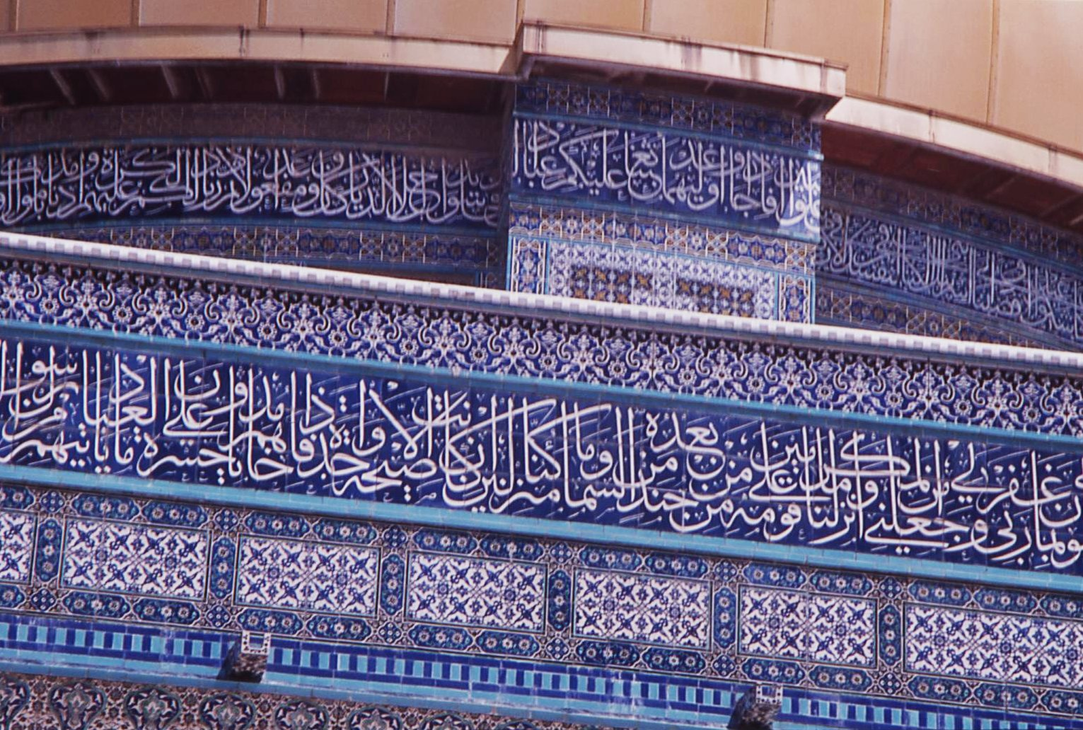 Detail des Felsendoms in Jerusalem. Fotografiert von Barbara Kabel, 1982.